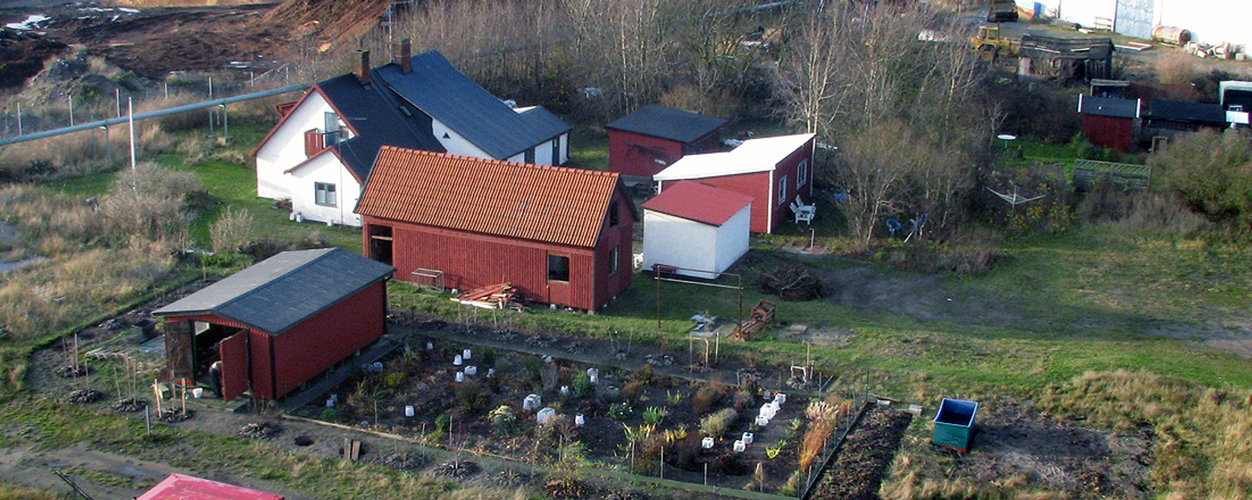 Revhusen 15 nov 2009. 26 nov 2012 finns bara det vita dubbelhuset på övre bilden kvar. Bilderna är tagna från toppen av FALK tanken som revs sommaren 2012. Det vita huset var det sista, 24 dec 2013 var det rivet ner till grunden.